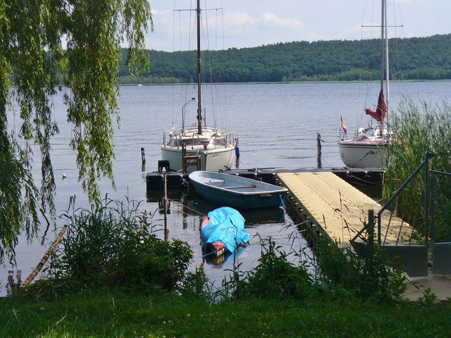 Mittelbusch - Anlegestelle (Jetty)